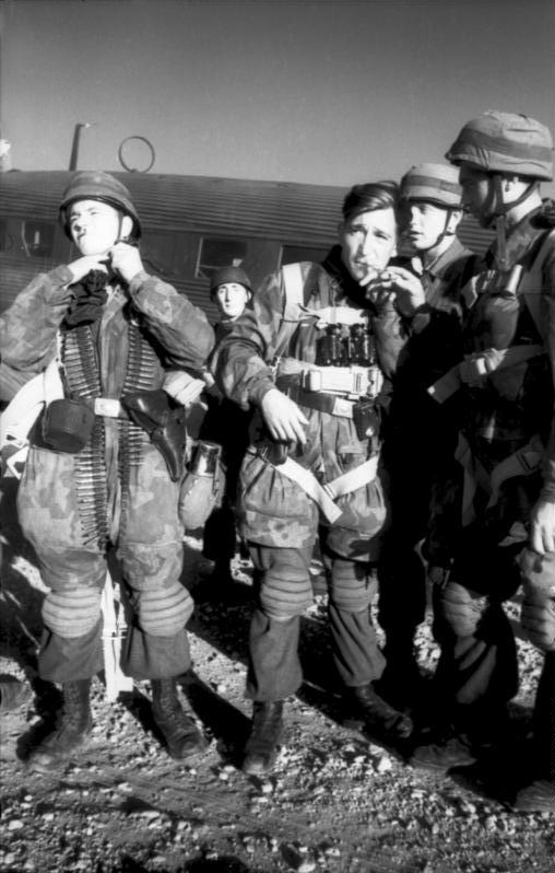 12.11.1943 Fallschirmjäger für Leros! Fallschirmjäger steigen in ihre wohlbekannte Ju Information added by Wikimedia users.